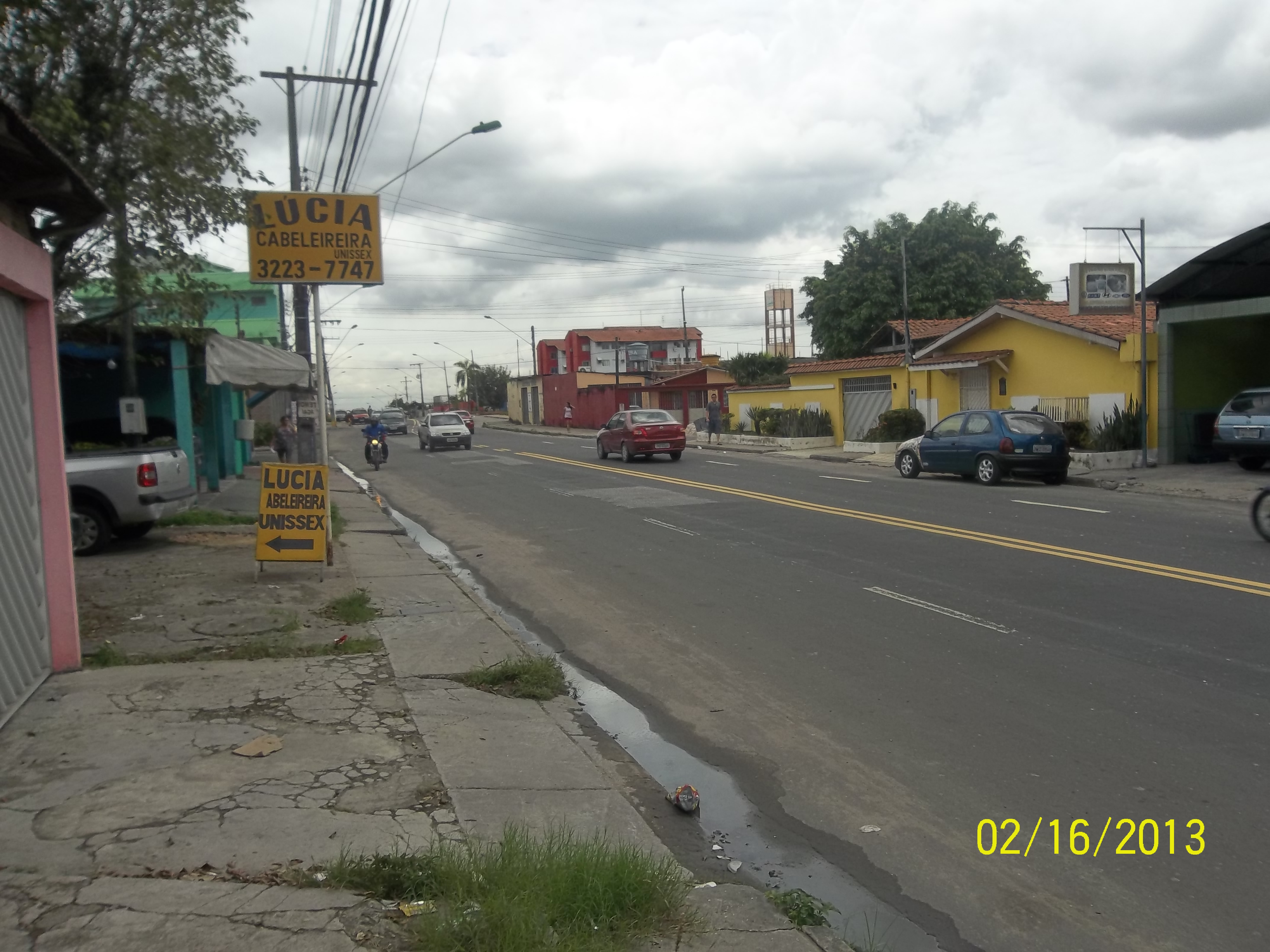 Avenida João Câmara, no bairro Novo Aleixo, em Manaus.